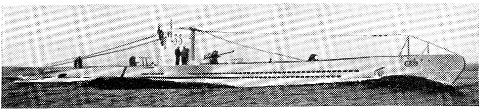 German submarine "U-33" (1936)